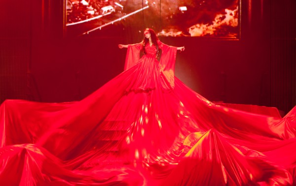 Анна Плетнёва на Концерте в Крокус Сити Холле исполняет песню Аве Мария